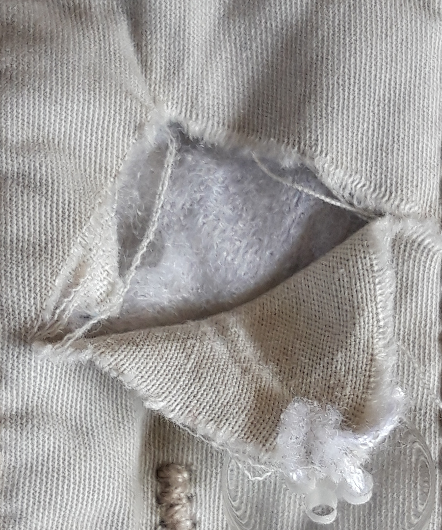 winkelhaak door afgescheurde knoop